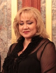 Казань, «Рахлинские сезоны». Ольга Бородина 2013 год.